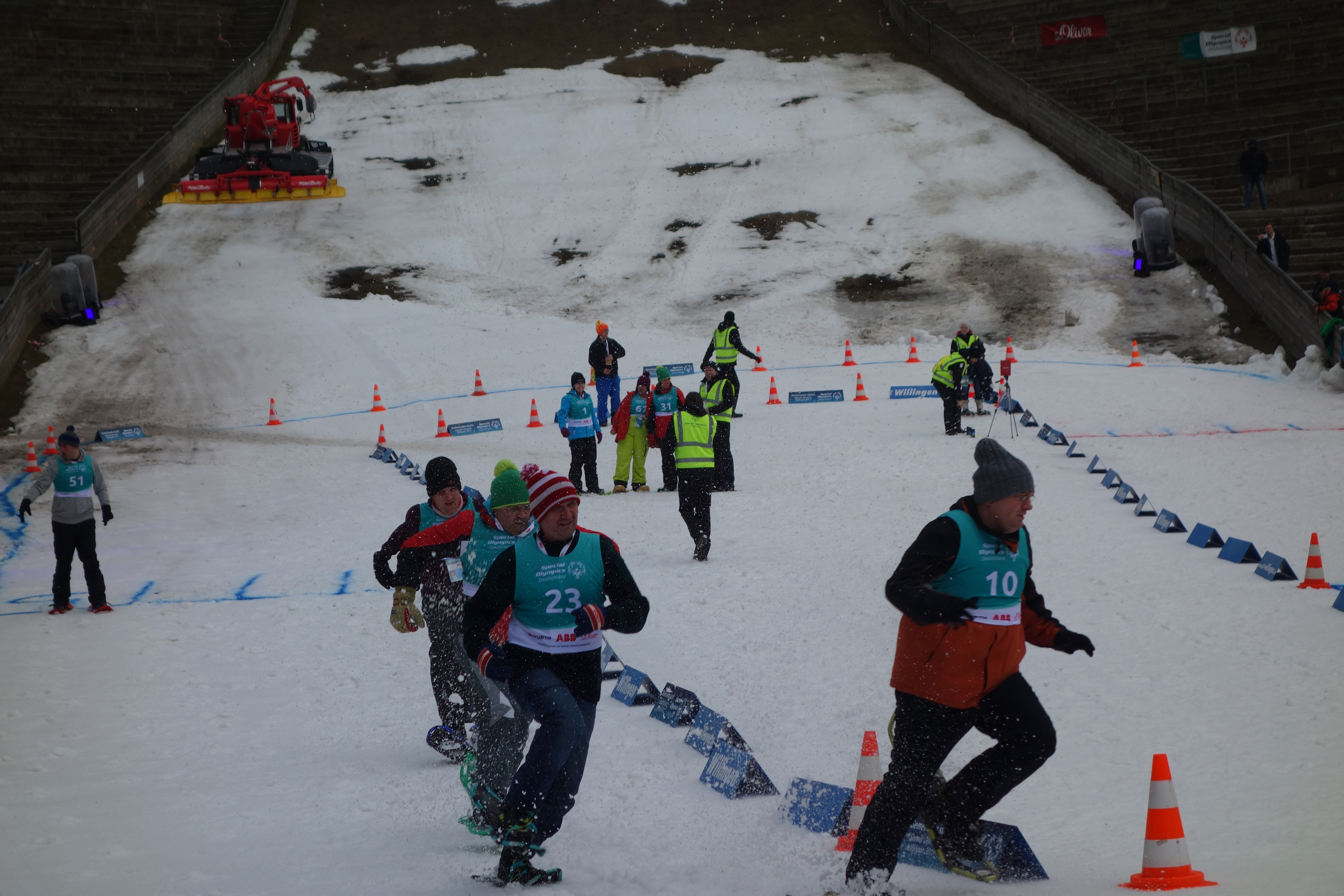 Schneeschuhlauf-Wettbewerb bei Special Olympics 2017 Willingen an der Mühlenkopfschanze.